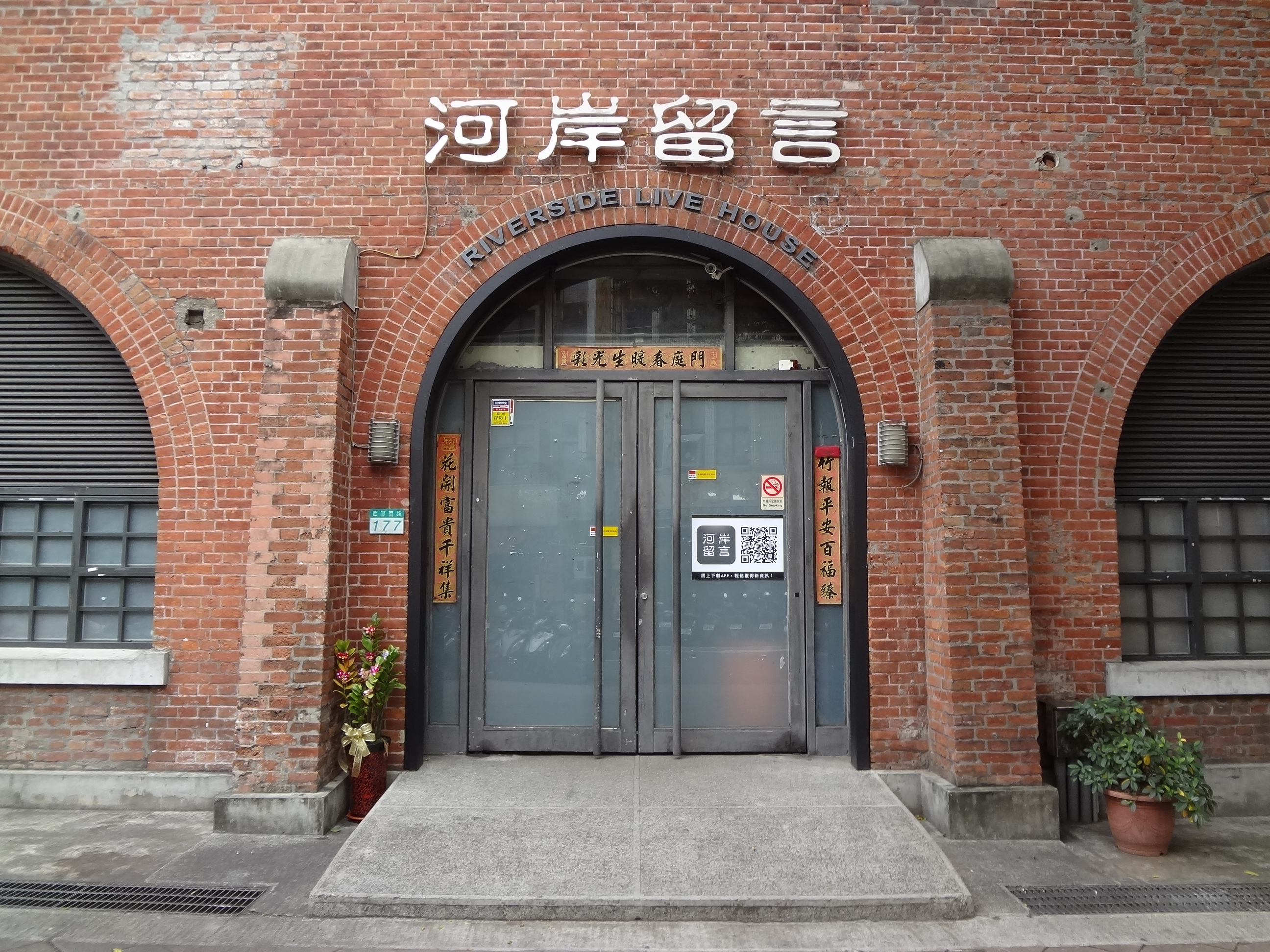 河岸留言西門紅樓展演館，位於臺北市萬華區西寧南路177號。